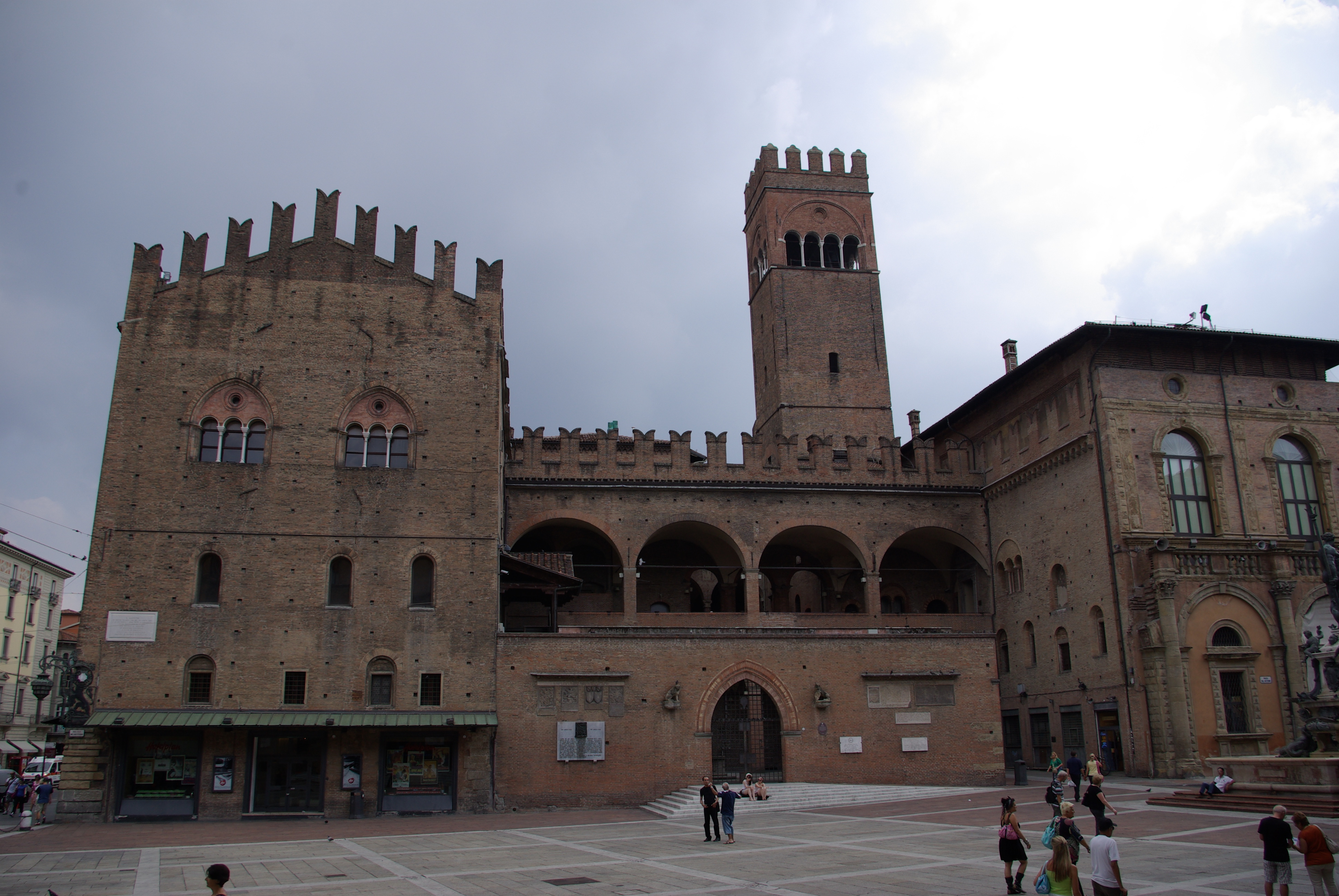 Palazzo di Re Enzo - MIBAC This is a photo of a monument which is part of cultural heritage of Italy.